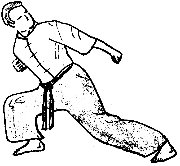 aka_point.jpg